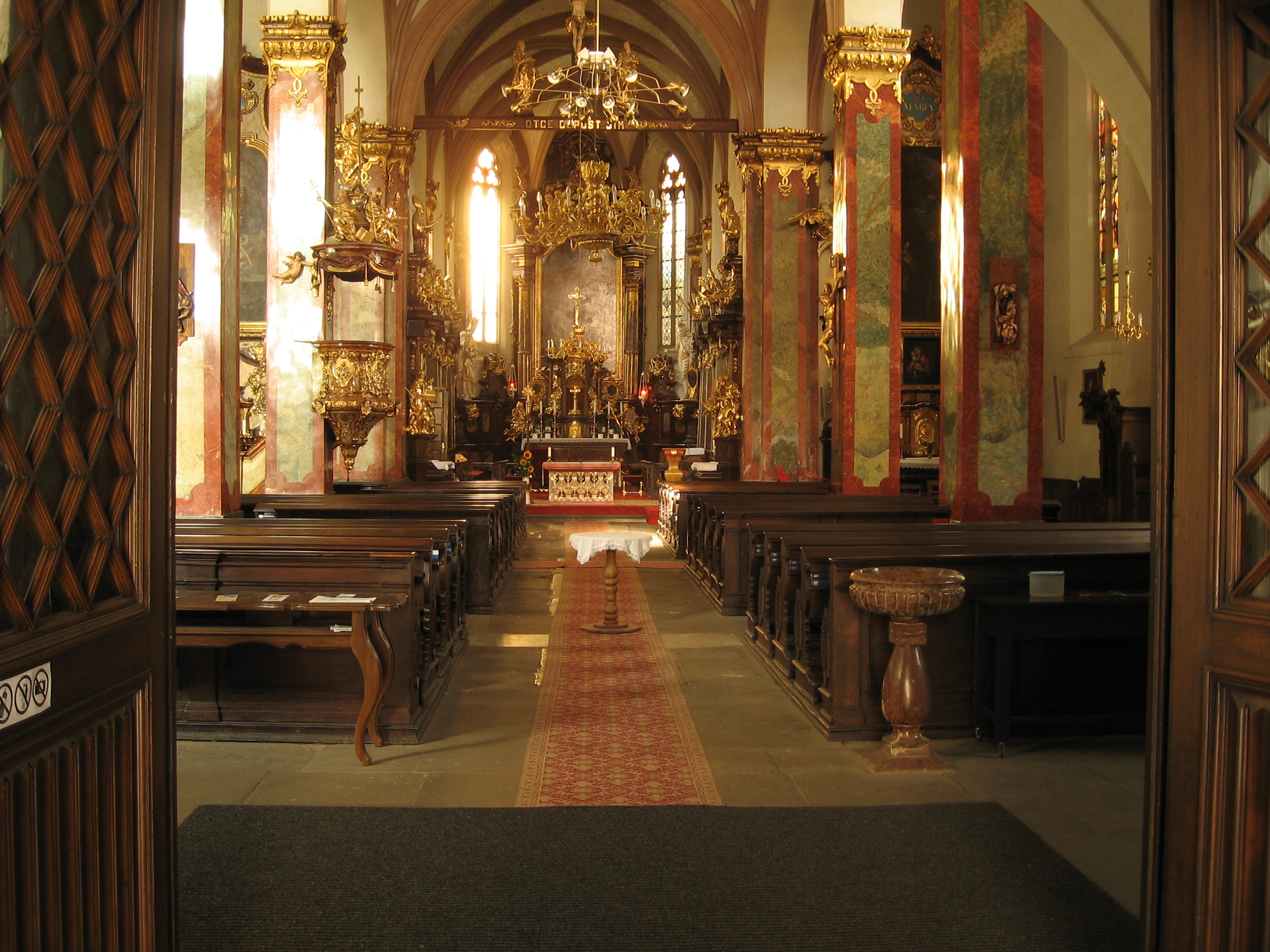 Kostel sv. Jindřicha a Kunhuty na Novém Městě, ul. Jindřišská, Praha. Pohled dovnitř.